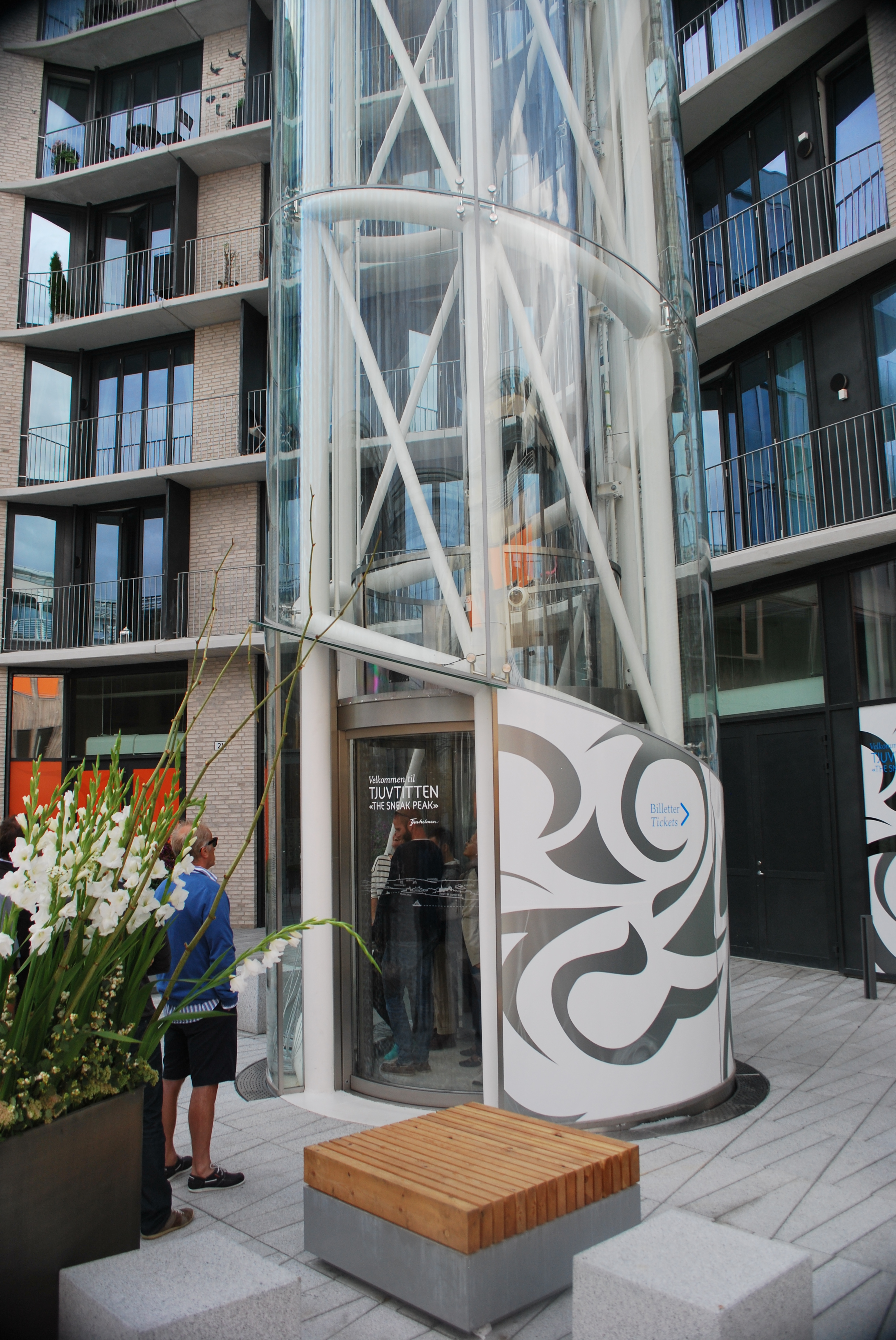 Tjuvtitten, utsiktstårn på Albert Nordengens plass, Holmen, Tjuvholmen, Oslo